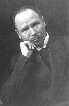 Кристьян Рауд, художник